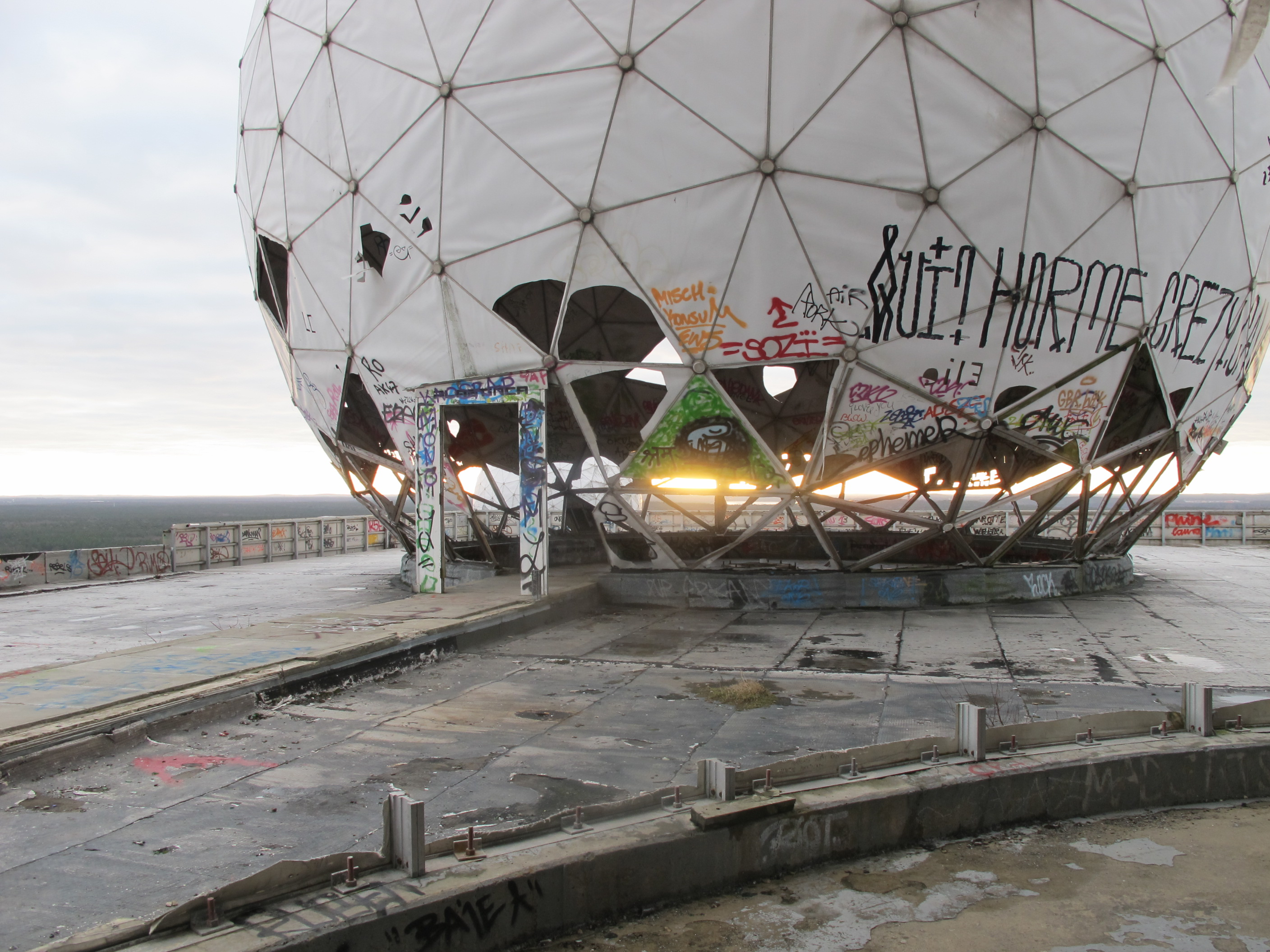 teufelsberg, radarturm